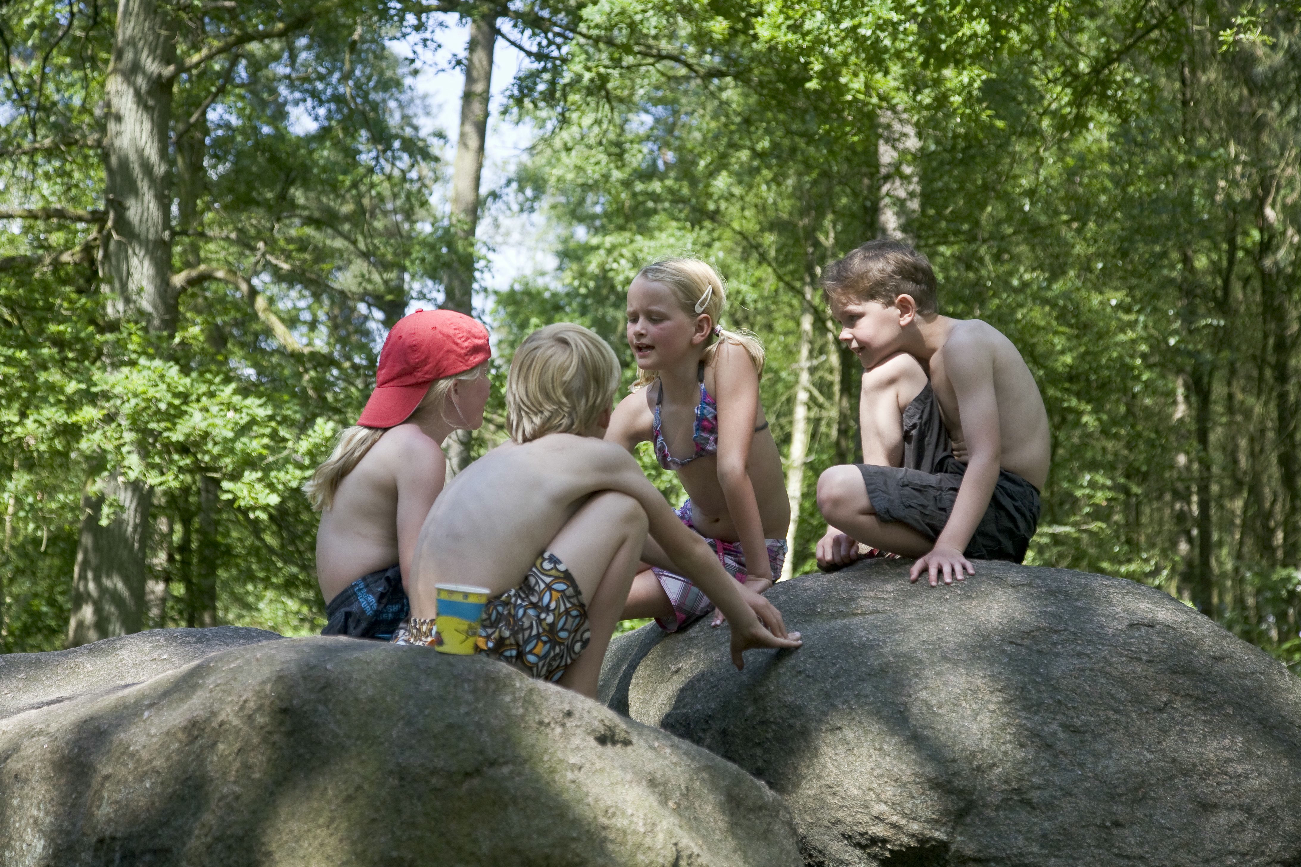 Hunebed D8: Strubben-Kniphorstbos, archeologisch reservaat, kinderen op hunebed D8 (opmerking: Gemaakt voor publicatie landschapsbiografie Drentse Aa)